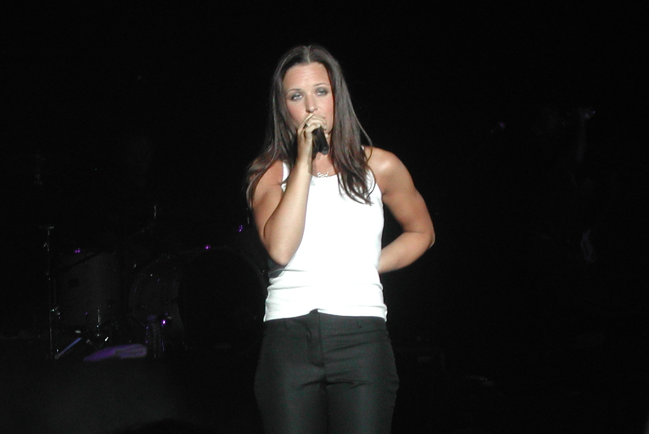 Natasha Saint-Pier en concert au Tampon.